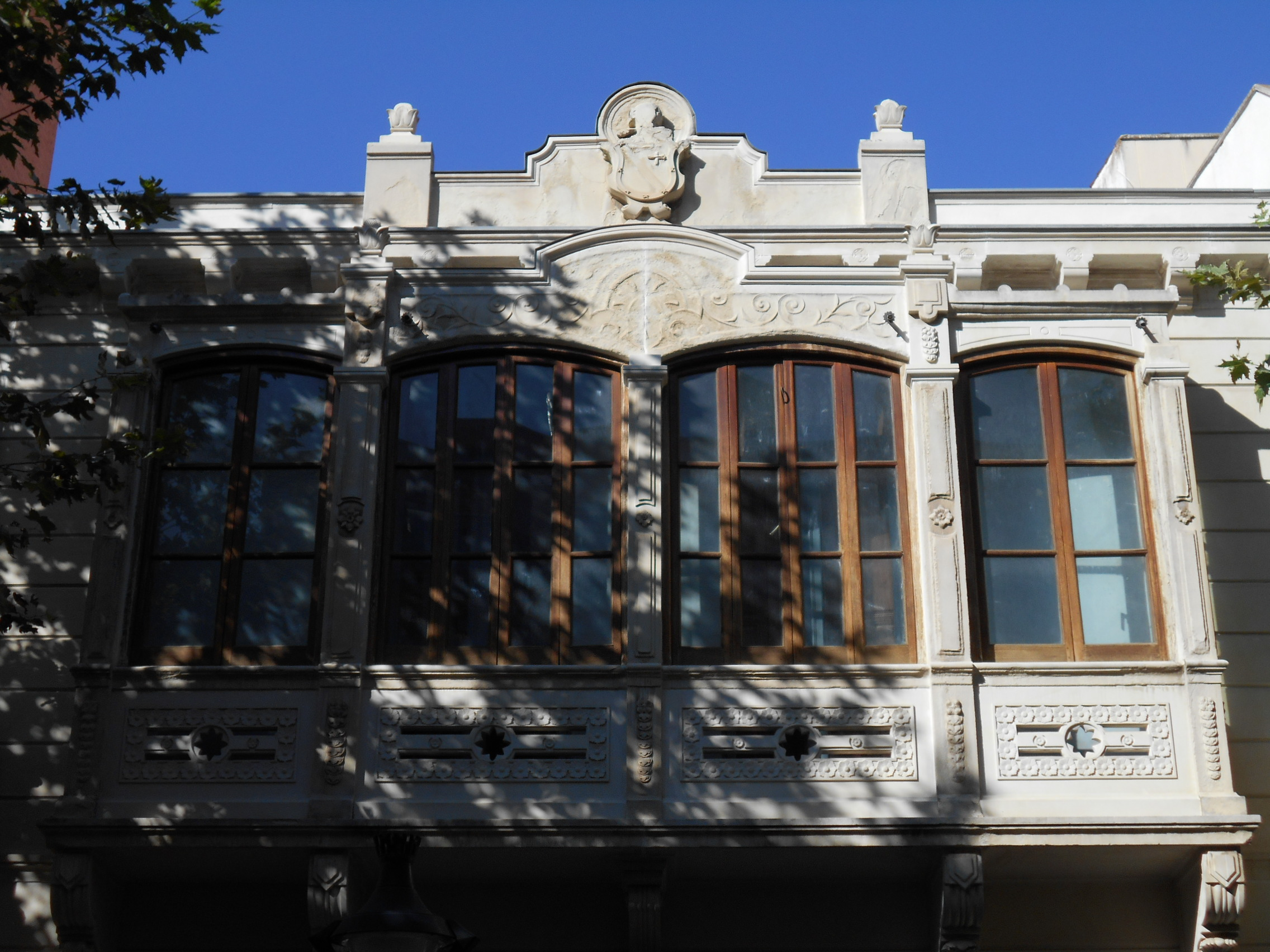 Fachada del Museo-Archivo Histórico Municipal Elisa Cendrero